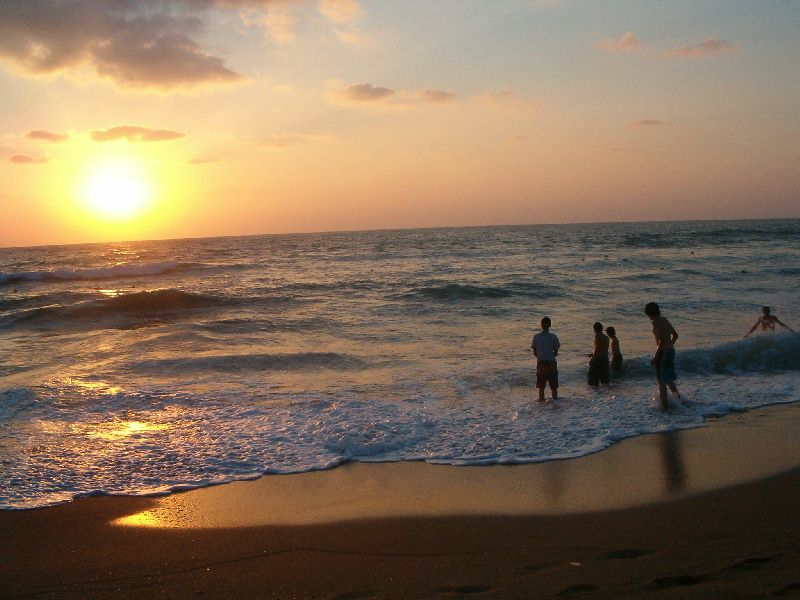 שקיעה בנהריה. taken by י.ש..